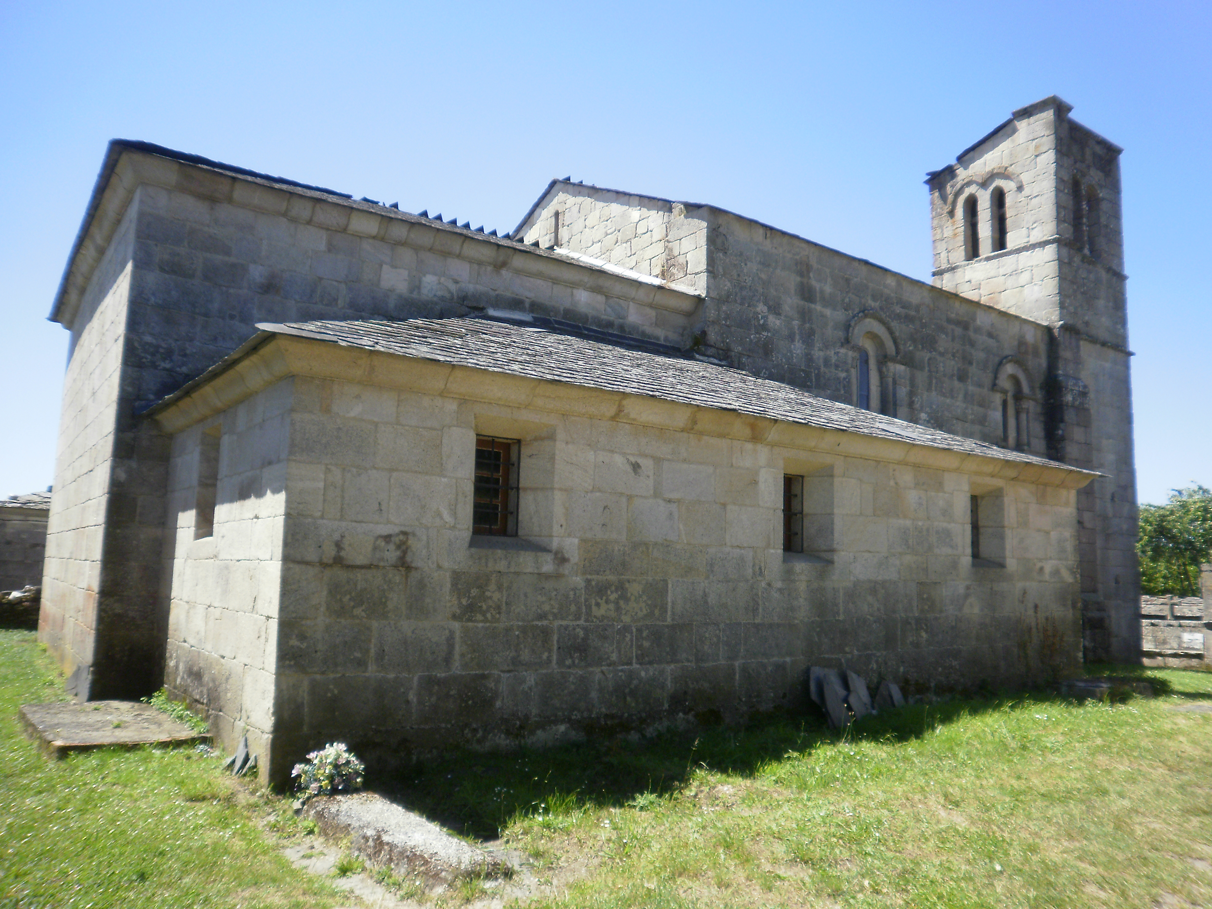 Iglesia de Santiago de Barbadelo, Sarria